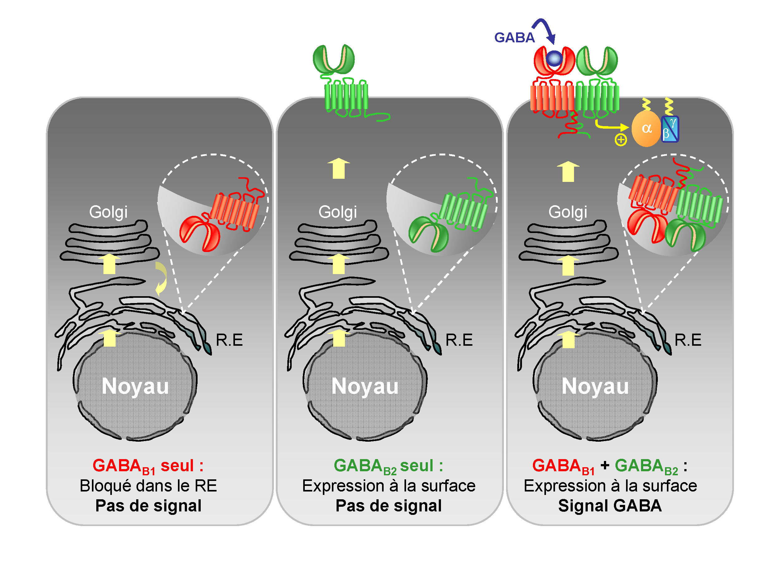 Envoie en surface d'un récepteur GABAB fonctionnel